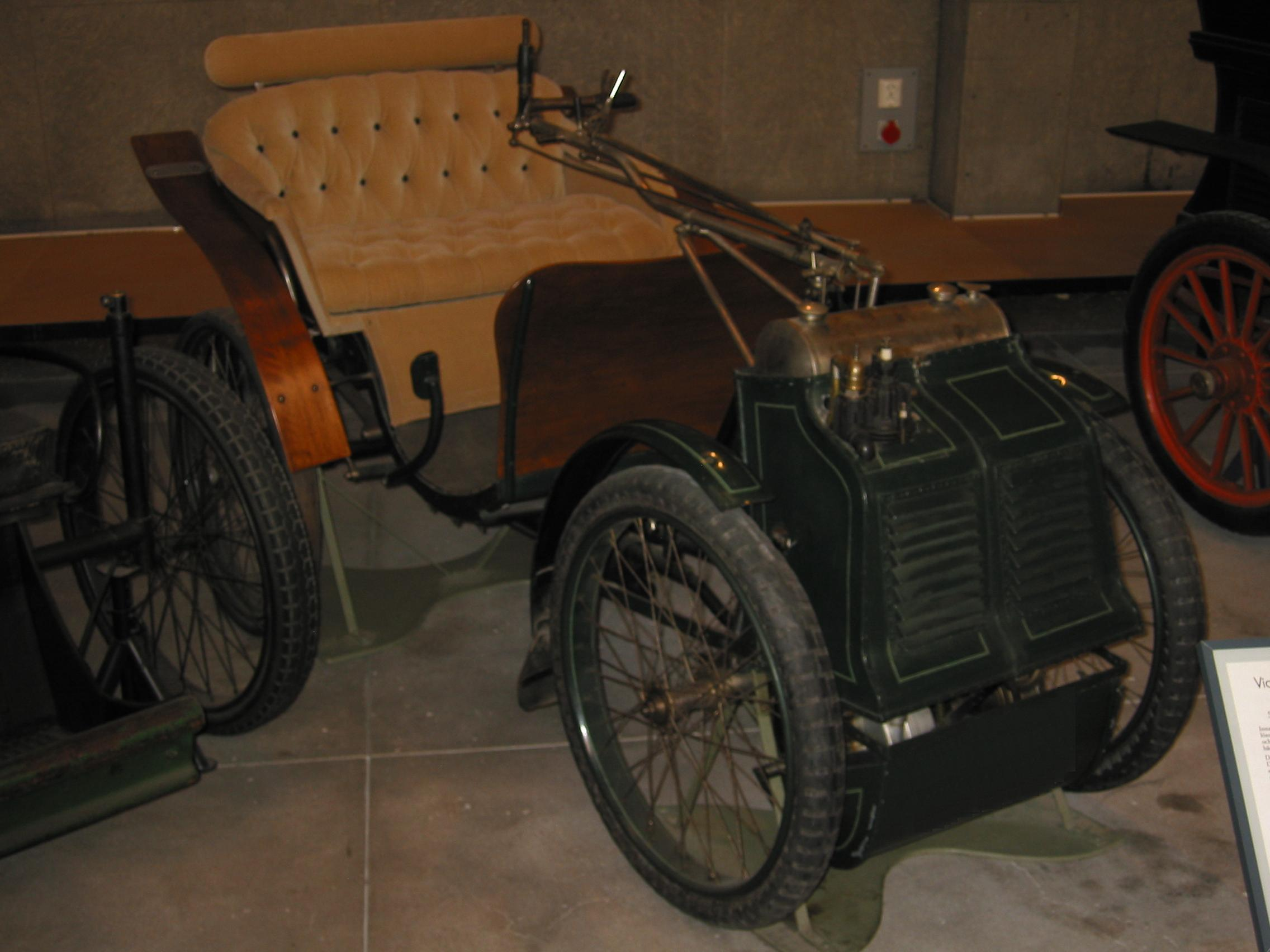 Parisienne 1899 Tekniska Museet: TEKS0030794